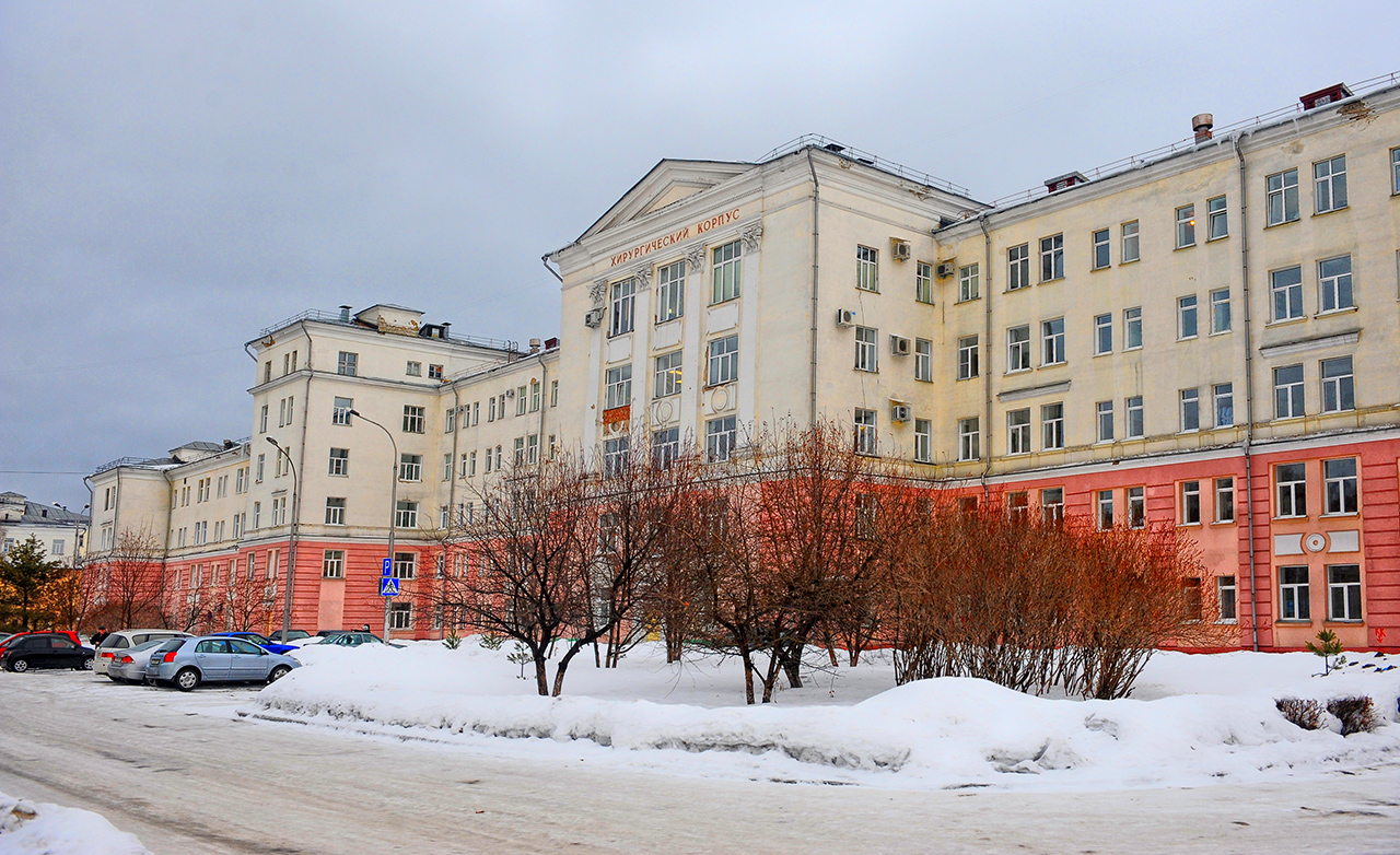 Хирургия